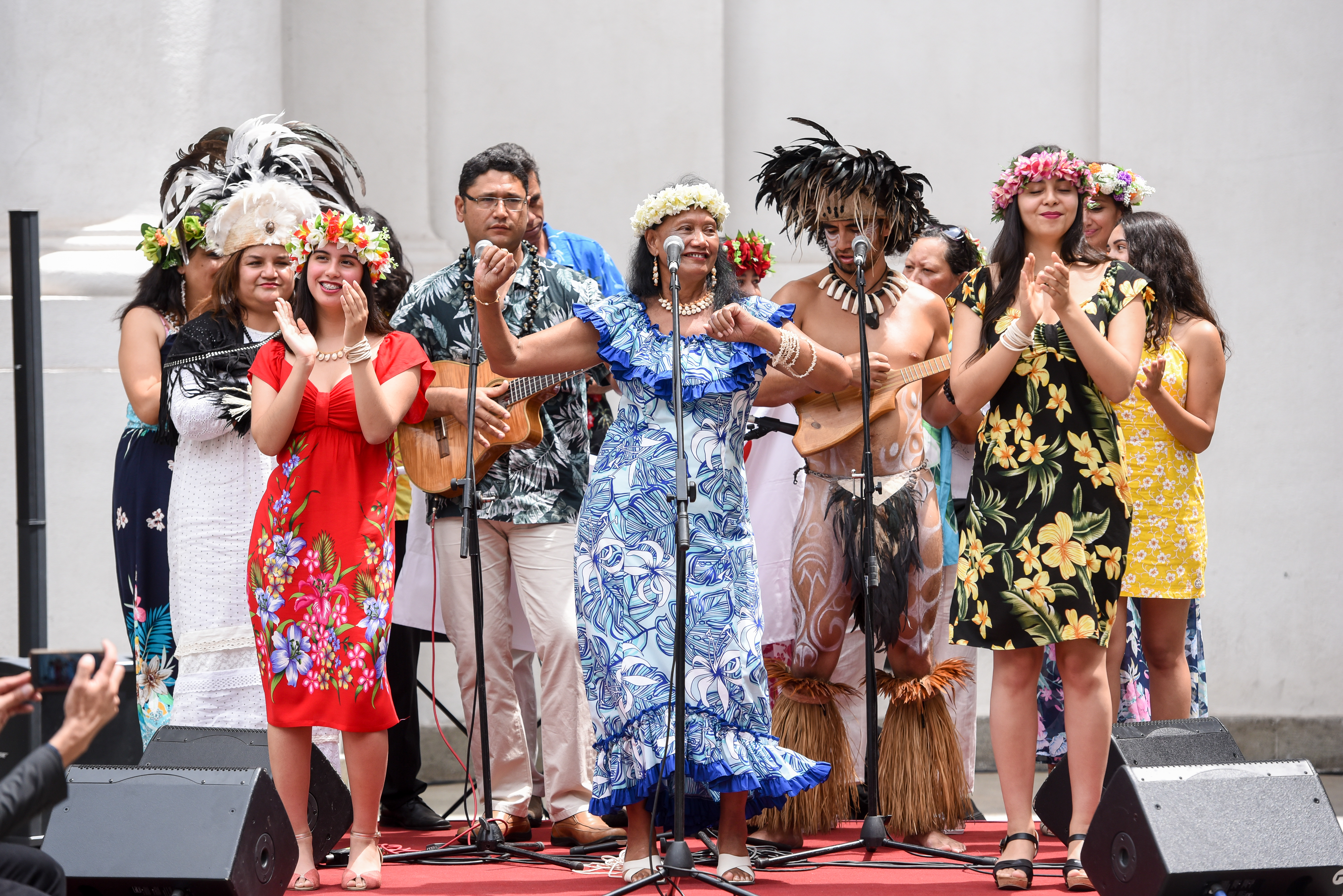 Ministra Paula Narváez participa en Reconocimiento “Tesoros Humanos Vivos 2017”